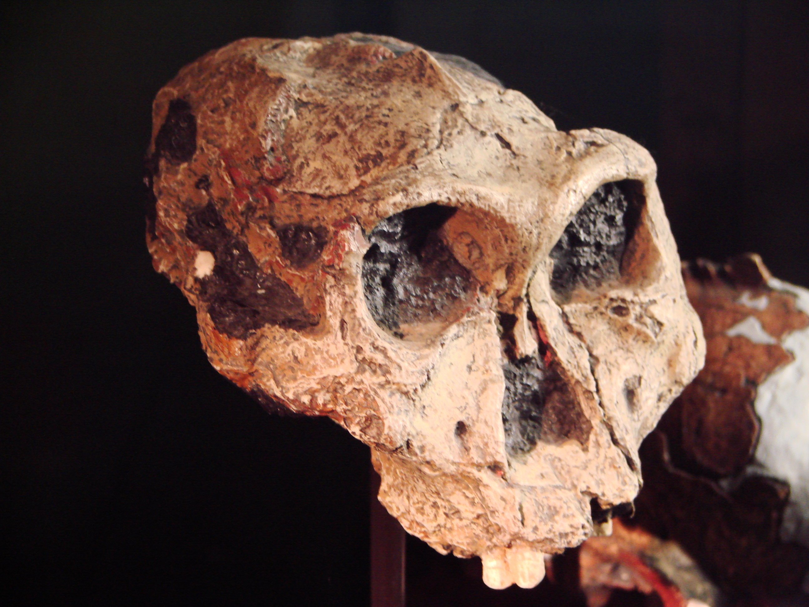 Muséum d'Anthropologie, campus universitaire d'Irchel, Université de Zurich (Suisse) : Moulage du crâne de Paranthropus robustus, crâne SK-48 (Swartkrans,Afrique du sud)